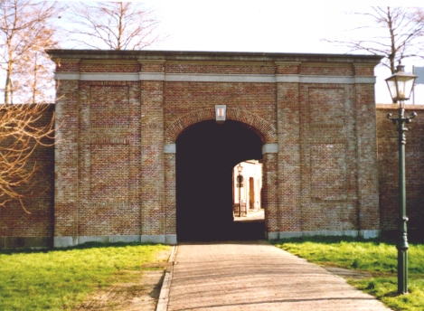 De Langepoort, één van de overgebleven stadspoorten van de vesting Brielle. Eigen foto, februari 2004.